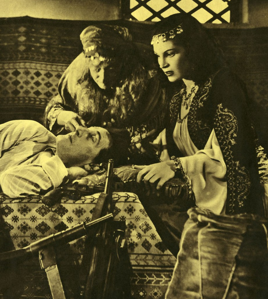 Carla Calò e Totò in Totò le Mokò